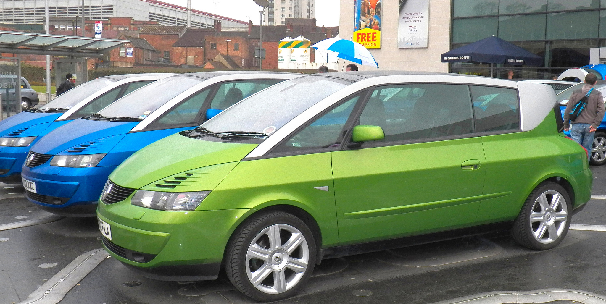 Renault Avantimes